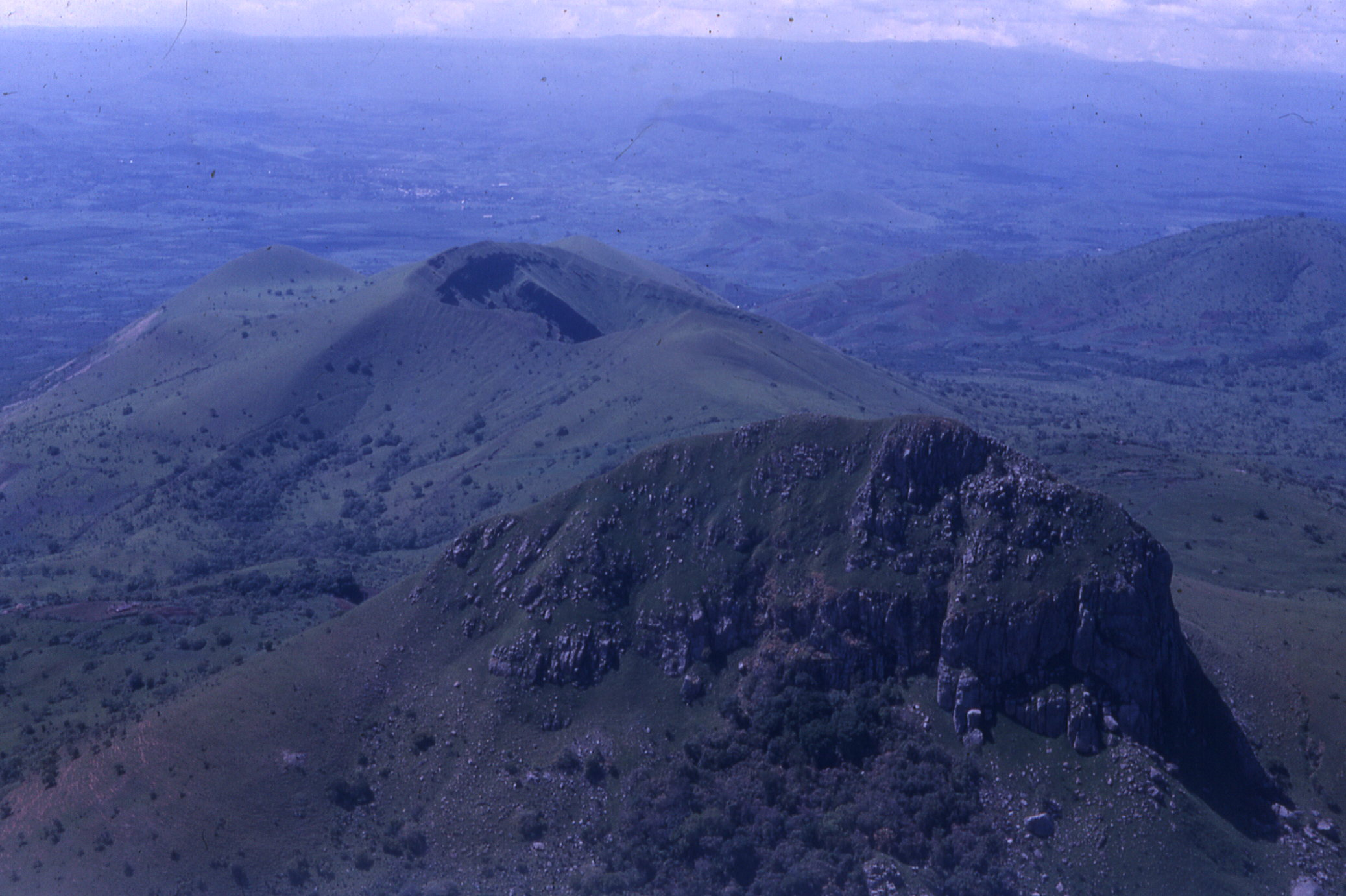 004R cam069 Le volcan du M'bapit en décembre 1966.